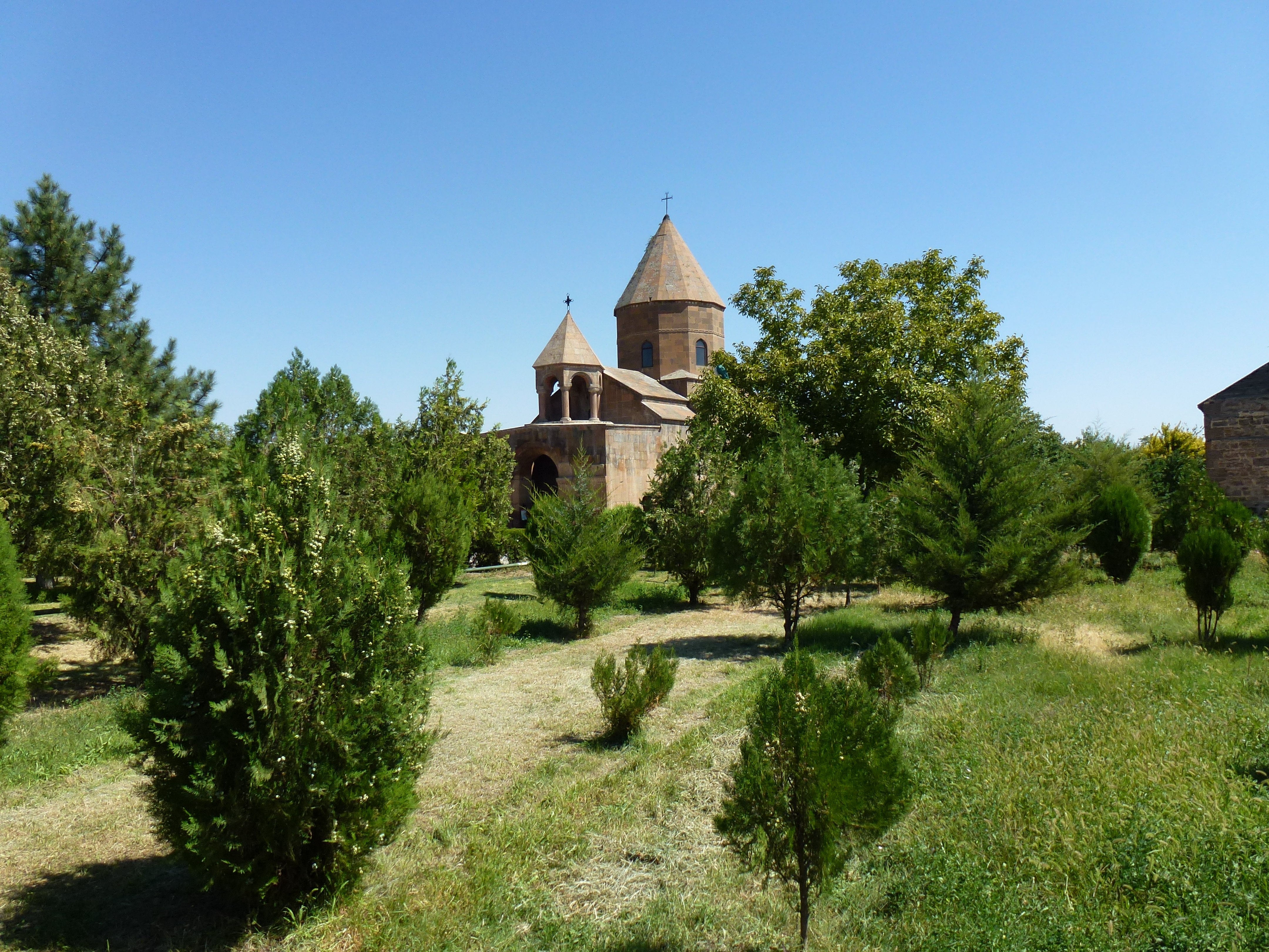 Սուրբ Շողակաթ եկեղեցի 2/18